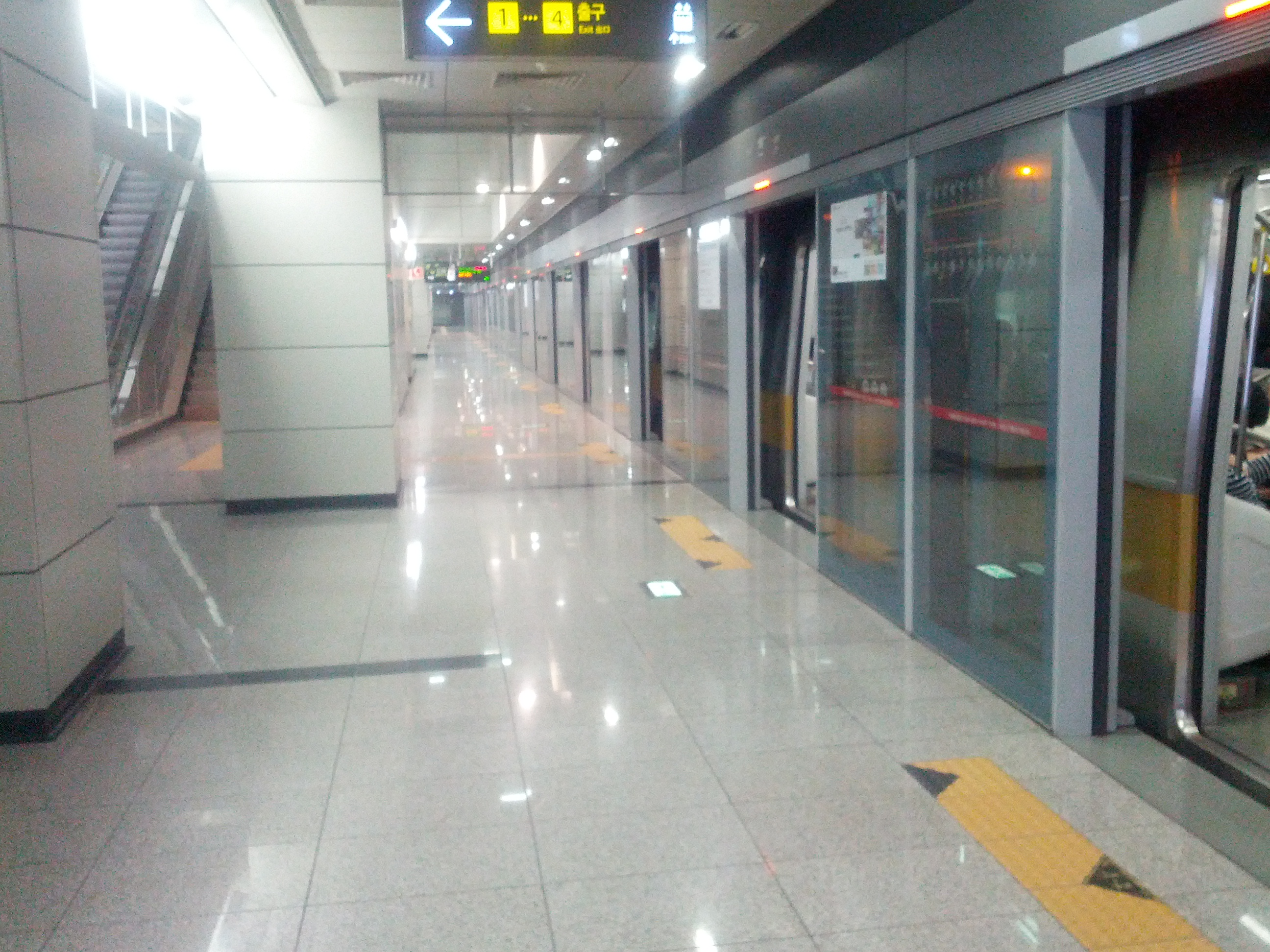 셋강역 승강장